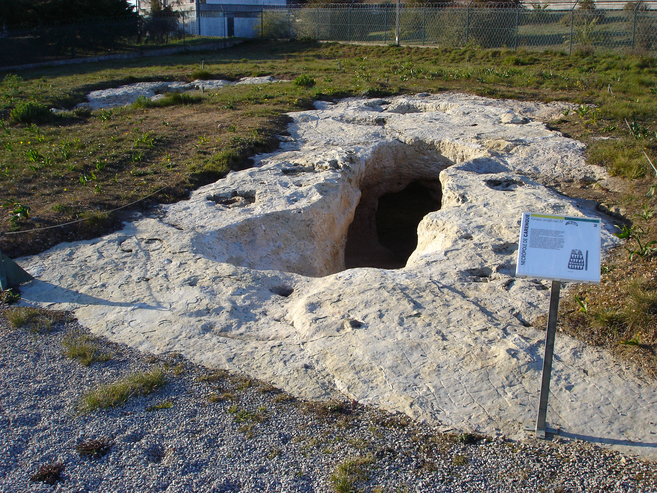 Necrópole de Carenque, Amadora, Portugal.